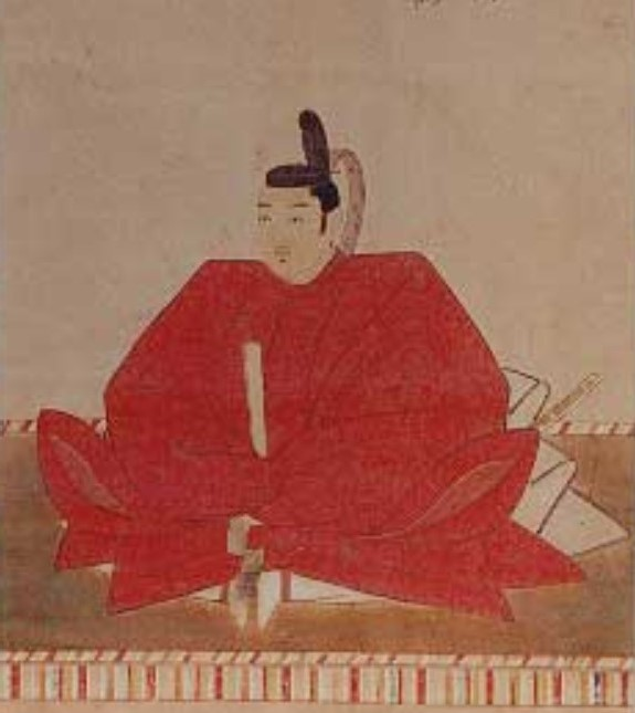 溝口宣勝の肖像。